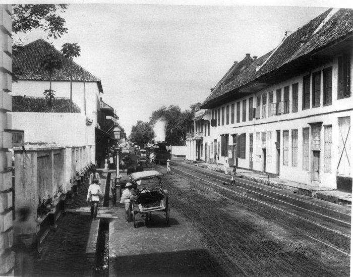 Foto. De Nieuwpoortstraat te Batavia, West-Java circa 1880.